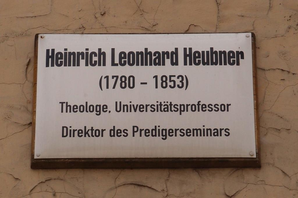 Tafel zur Erinnerung an den Theologen Heinrich Leonhard Heubner (1780-1853) in Wittenberg, Collegienstraße 54